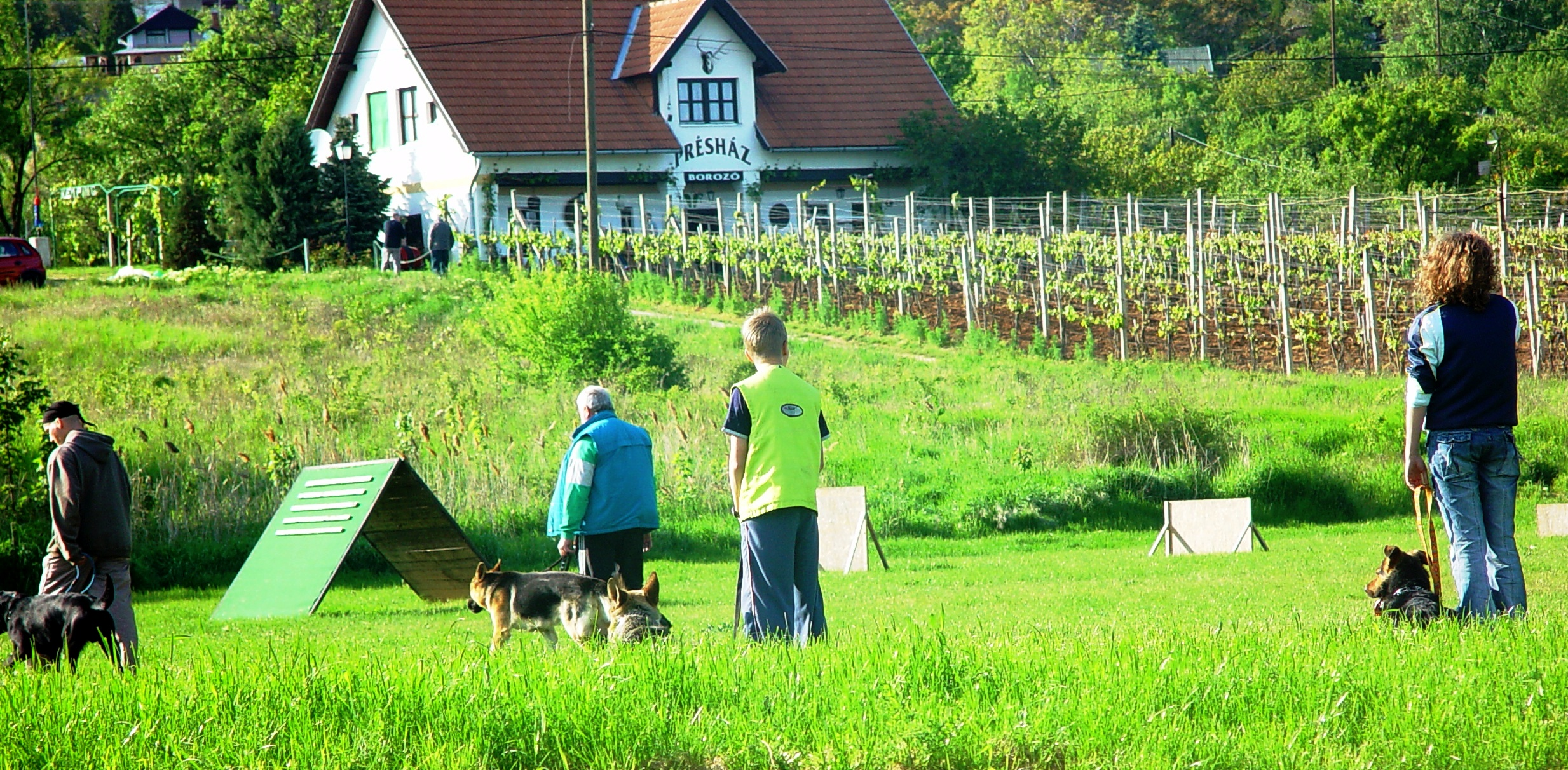 Egy kutyakiképző iskola. Hetente egyszer tanítják őket, hogy munkakutya legyen belőlük (Magyarország)